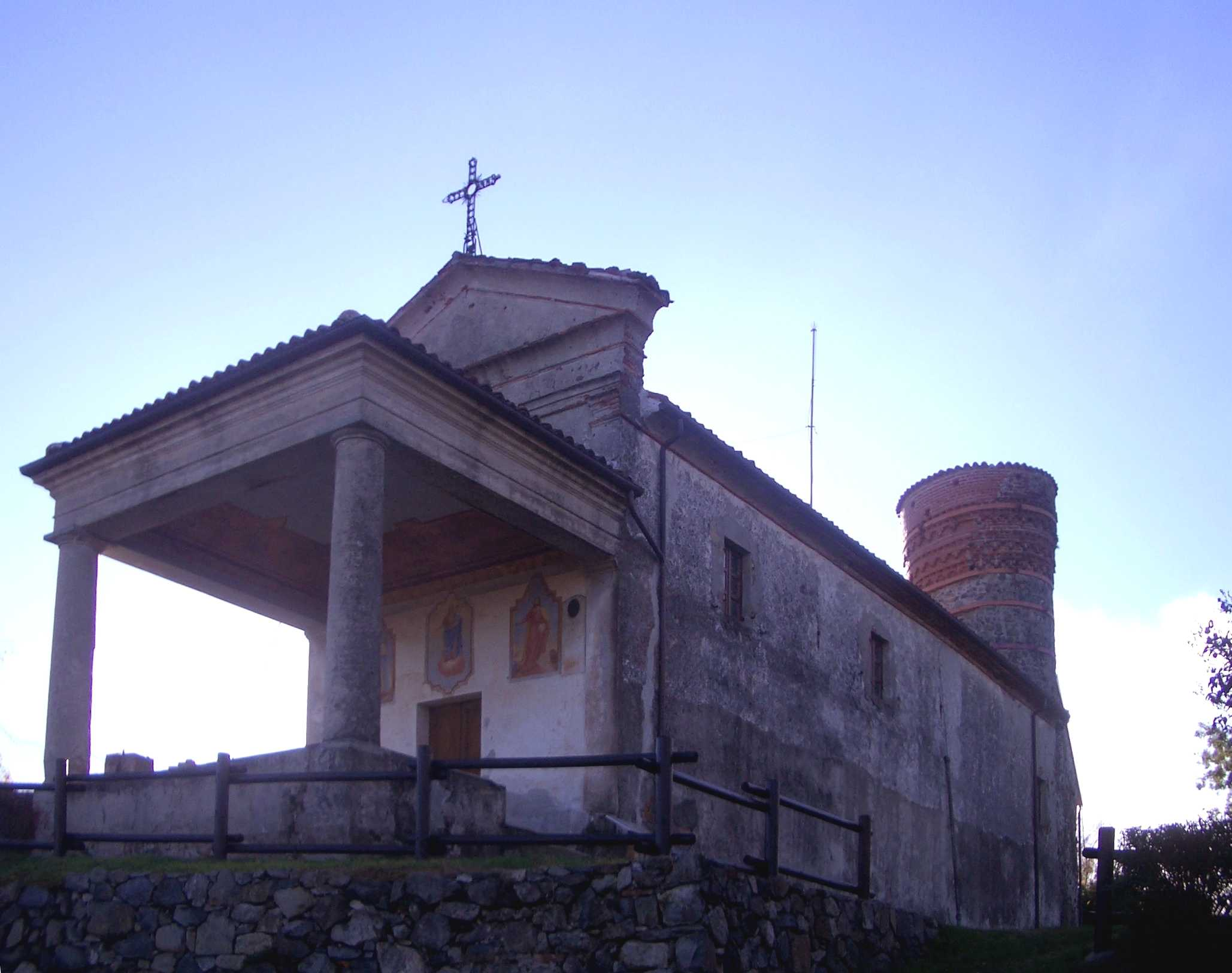 “Chiesa di Sant’Urbano”, Salerano Canavese, Turin, Italy